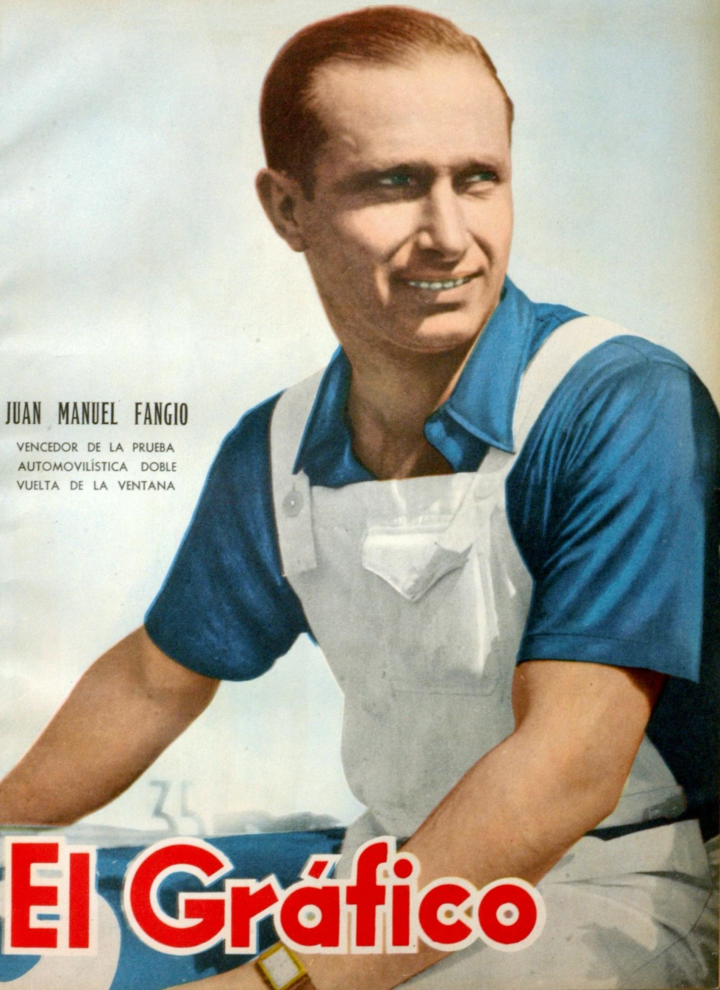 El Grafico del 07 de Noviembre de 1947. Edicion 1478